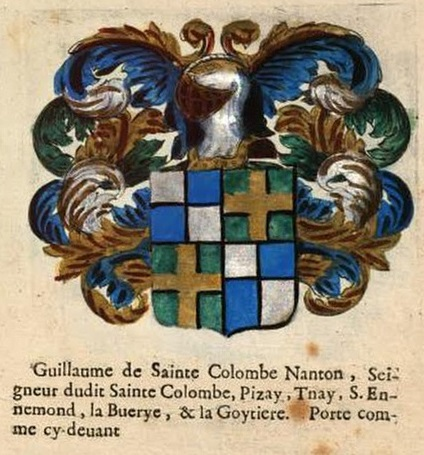 Wapen van Guillaume de Nanton de Saint-Colombe (1598/1633-1686). Handgekleurde gravure. Afkomstig uit: Claudine Brunand (1669) Armorial veritable de la Noblesse qui a esté Reconnuë, et approuuée dans la Recherche qui en à esté faite ez années M.DC.LXVII. et M.DC.LXVIII. pour les Pays de Lionnois, Forests, et Beaujolois [...], [Lyon]: Claudine Brunand.fol. 20, recto.